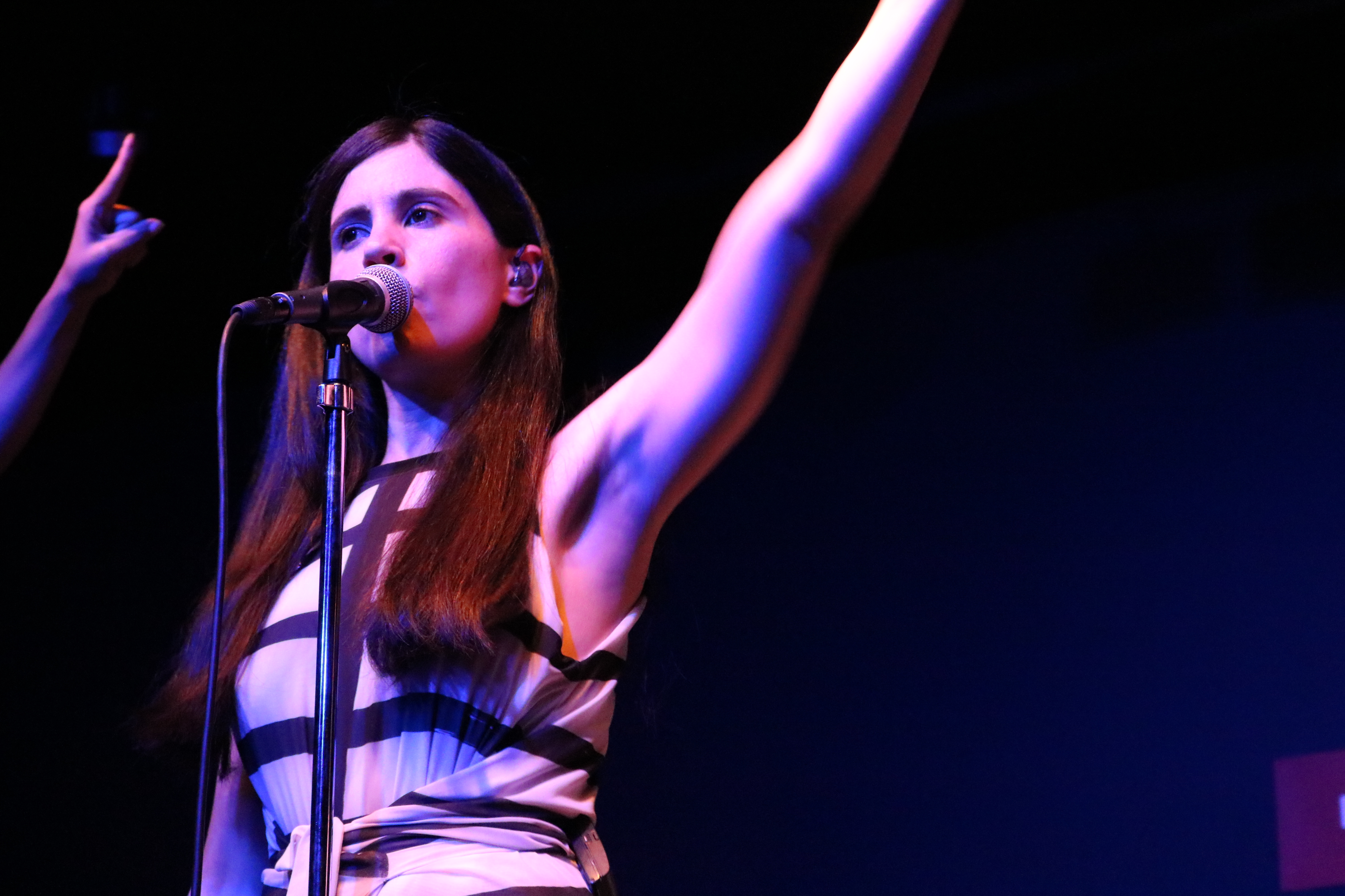 Concierto de Javiera Mena 「ハビエラ・メナ」コンサート